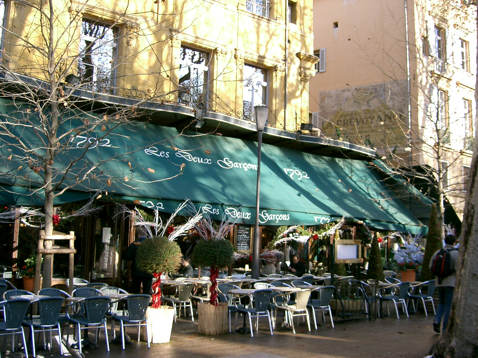 Le café des deux garçons, à Aix-en-Provence. Terrasse de la brasserie du XVIIIe à laquelle reste attaché le souvenir de la jeunesse de Zola et de Cézanne.